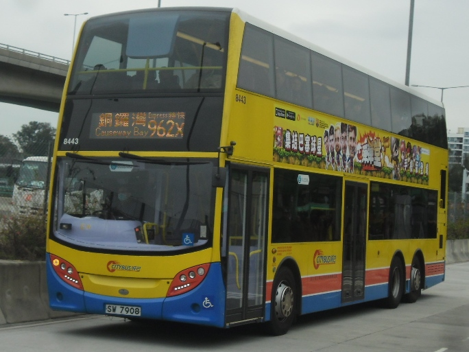 中文（香港）: 城巴962X線，正駛離屯門公路轉車站前往港島